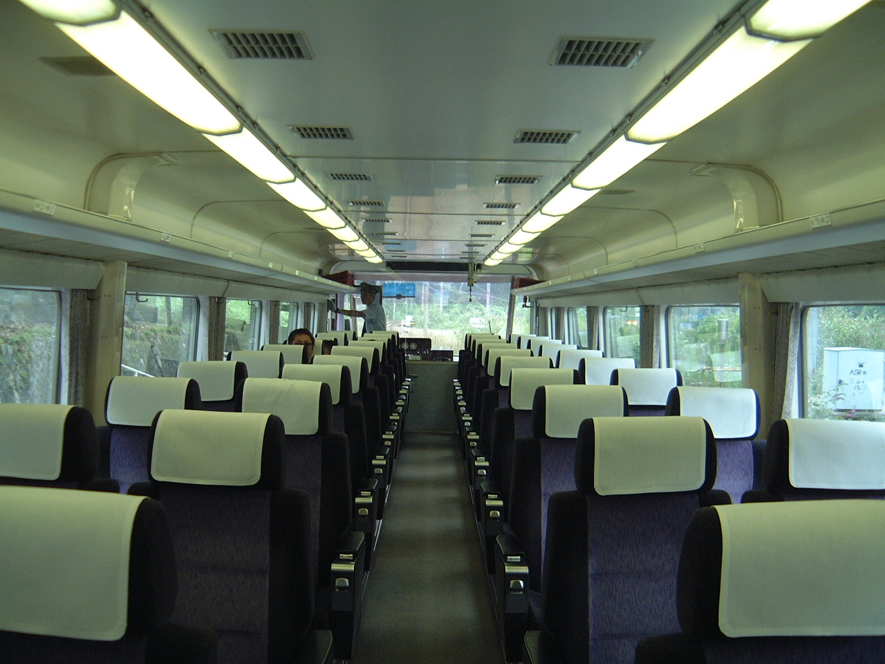 クロ381形 車内